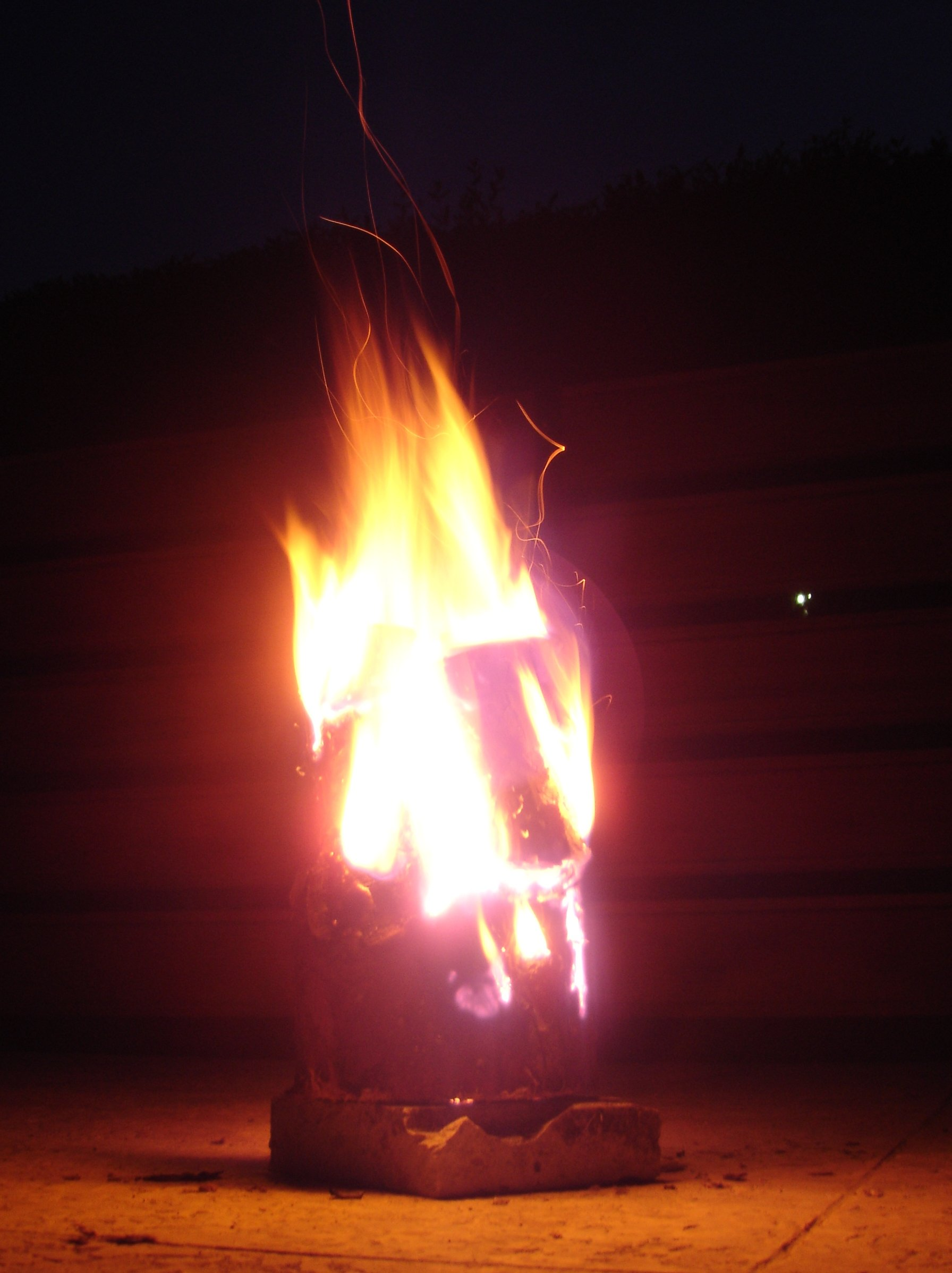 Das Bild zeigt eine brennende Schwedenfackel